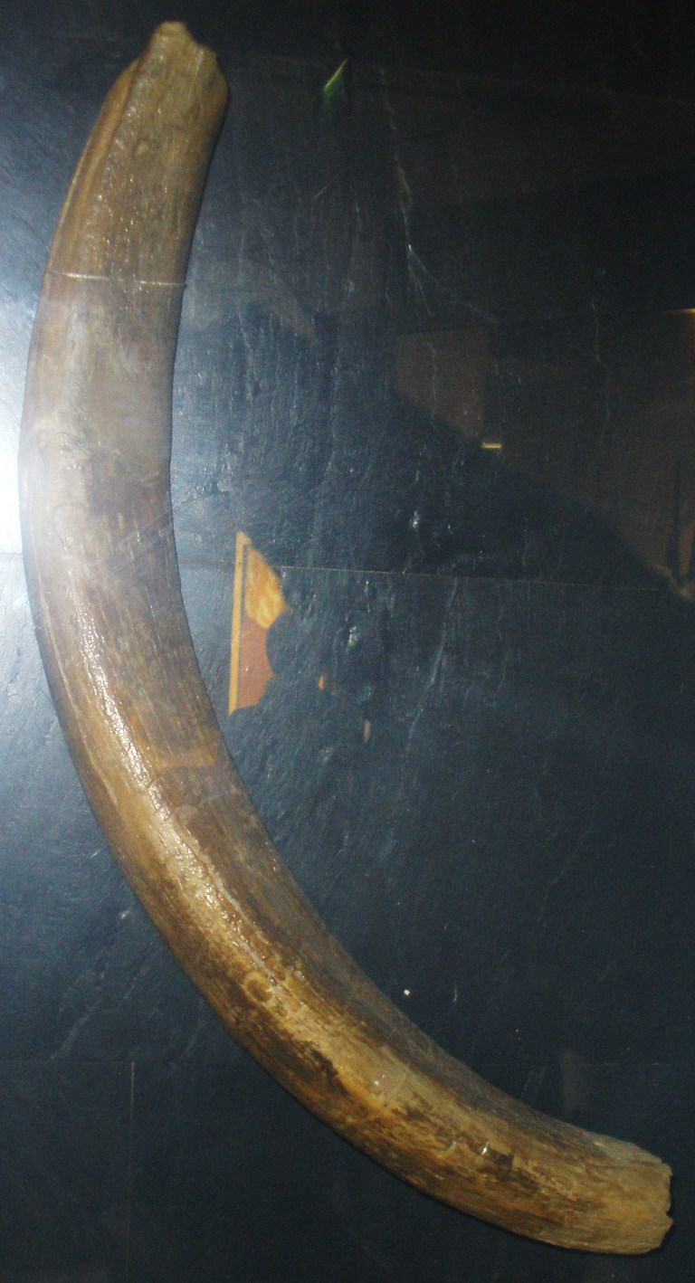 Fossil of Metridiochoerus, an extinct mammal -- Took the photo at Natural History Museum, London